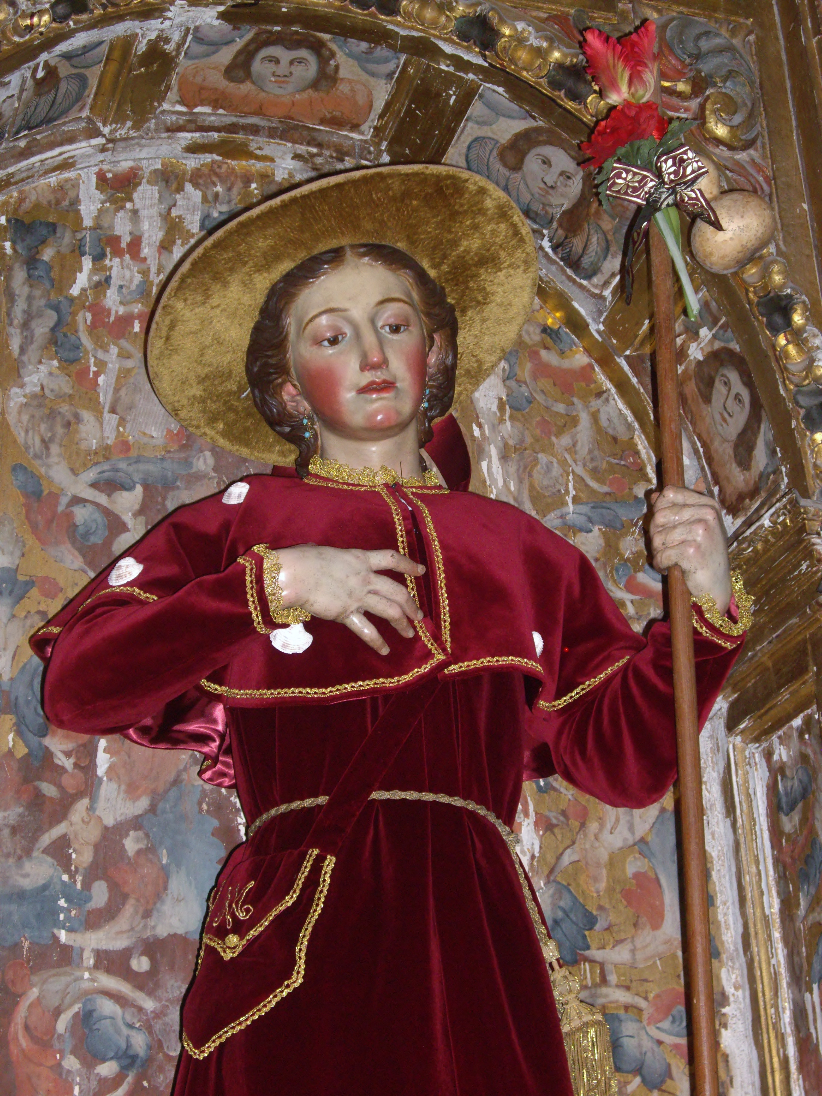 Imagen de la Virgen Peregrina de Ramón Álvarez Moretón . Zamora, Iglesia de San Antolín